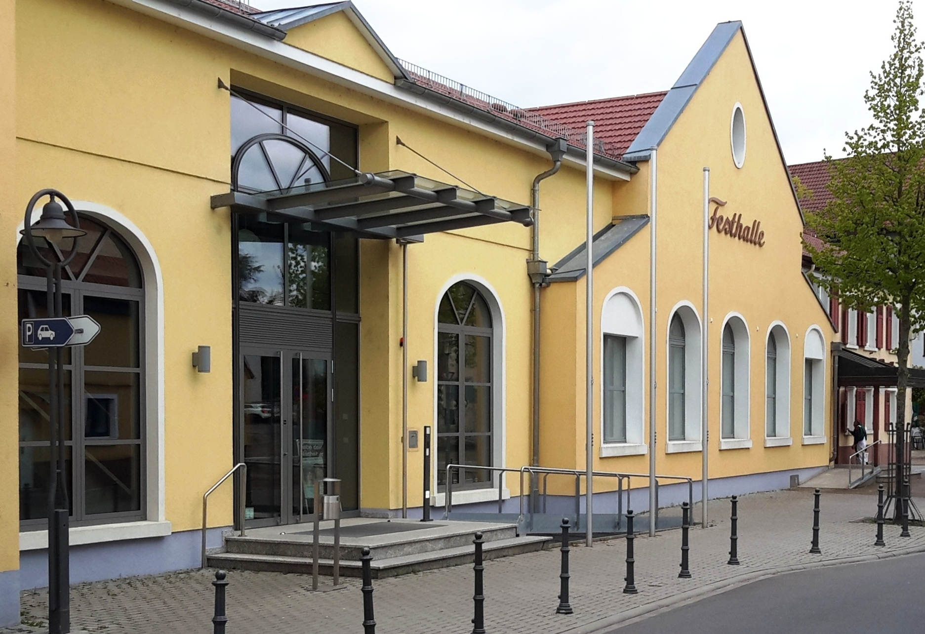 Bild der Festhalle, Hauptstraße 2 in D 68792 Brühl (Baden), von Südosten (Rathaus). Links der 2011 eingeweihte Foyer-Anbau, in der Mitte der 1962 eingeweihte Saalbau, rechts die 1734 als "Gasthaus zum Ochsen" eingeweihte jetzige "Ratsstube".